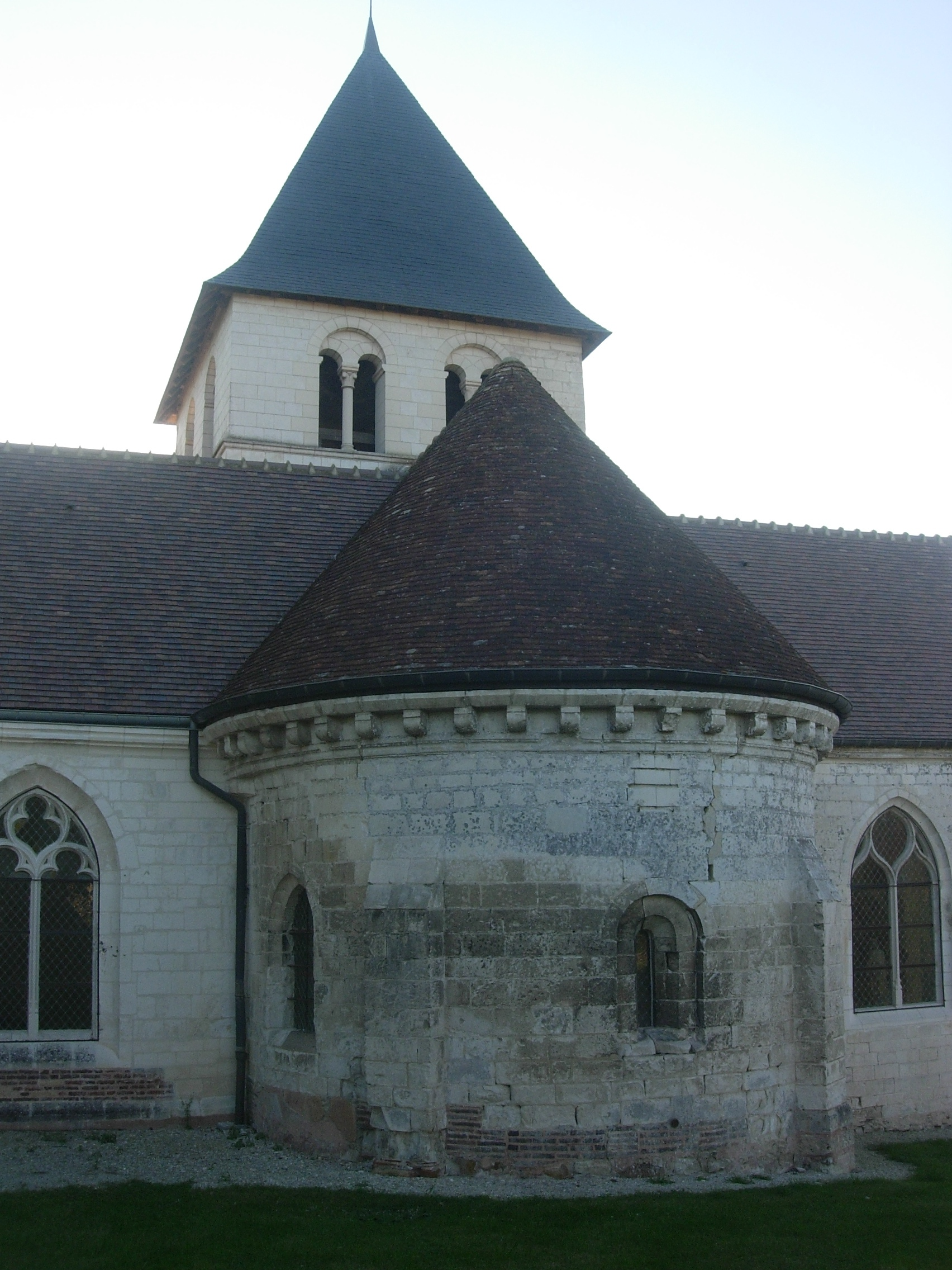 Eglise de Villacerf .